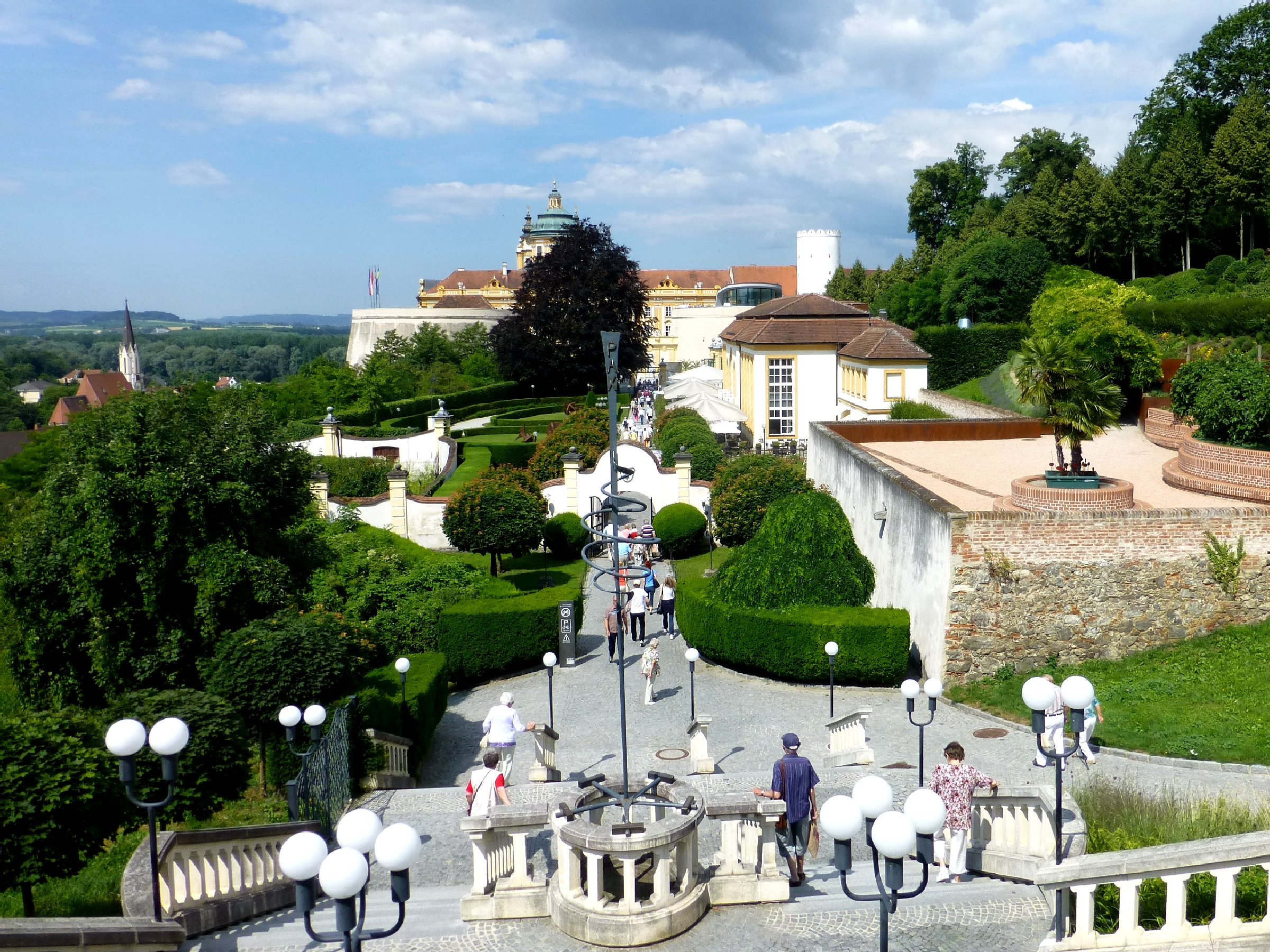 Stift Melk Austria